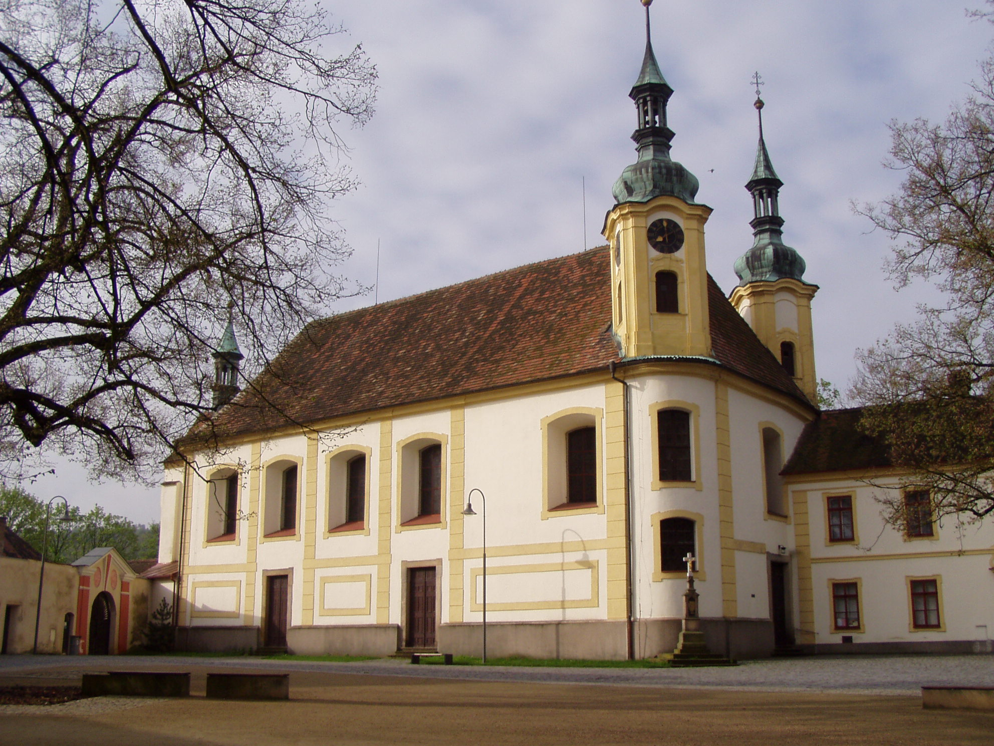 Kostel Nejsvětější Trojice v Opočně